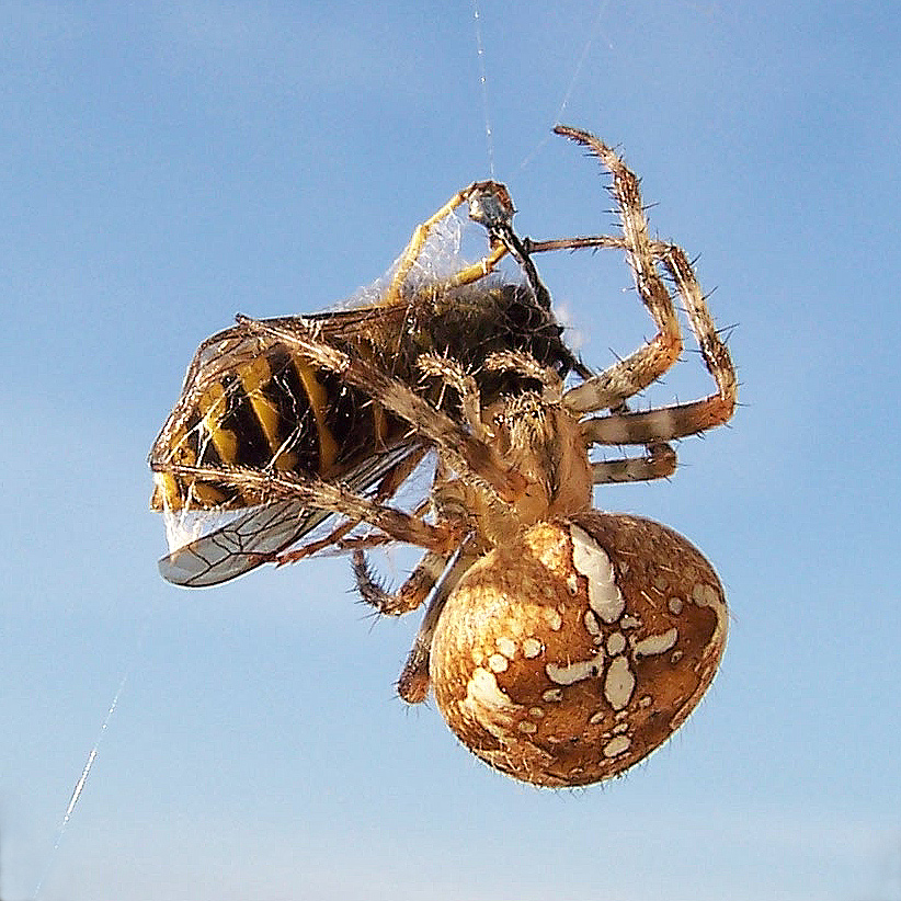 Araneus diadematus (Gartenkreuzspinne mit Wespe)